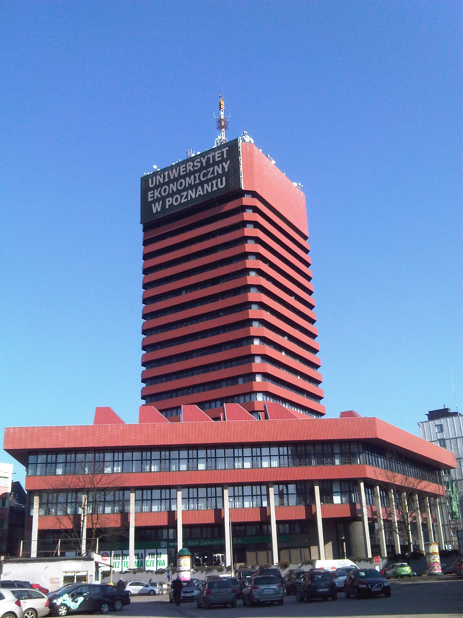 Uniwersytet Ekonomiczny w Poznaniu - wieżowiec Collegium Altum.